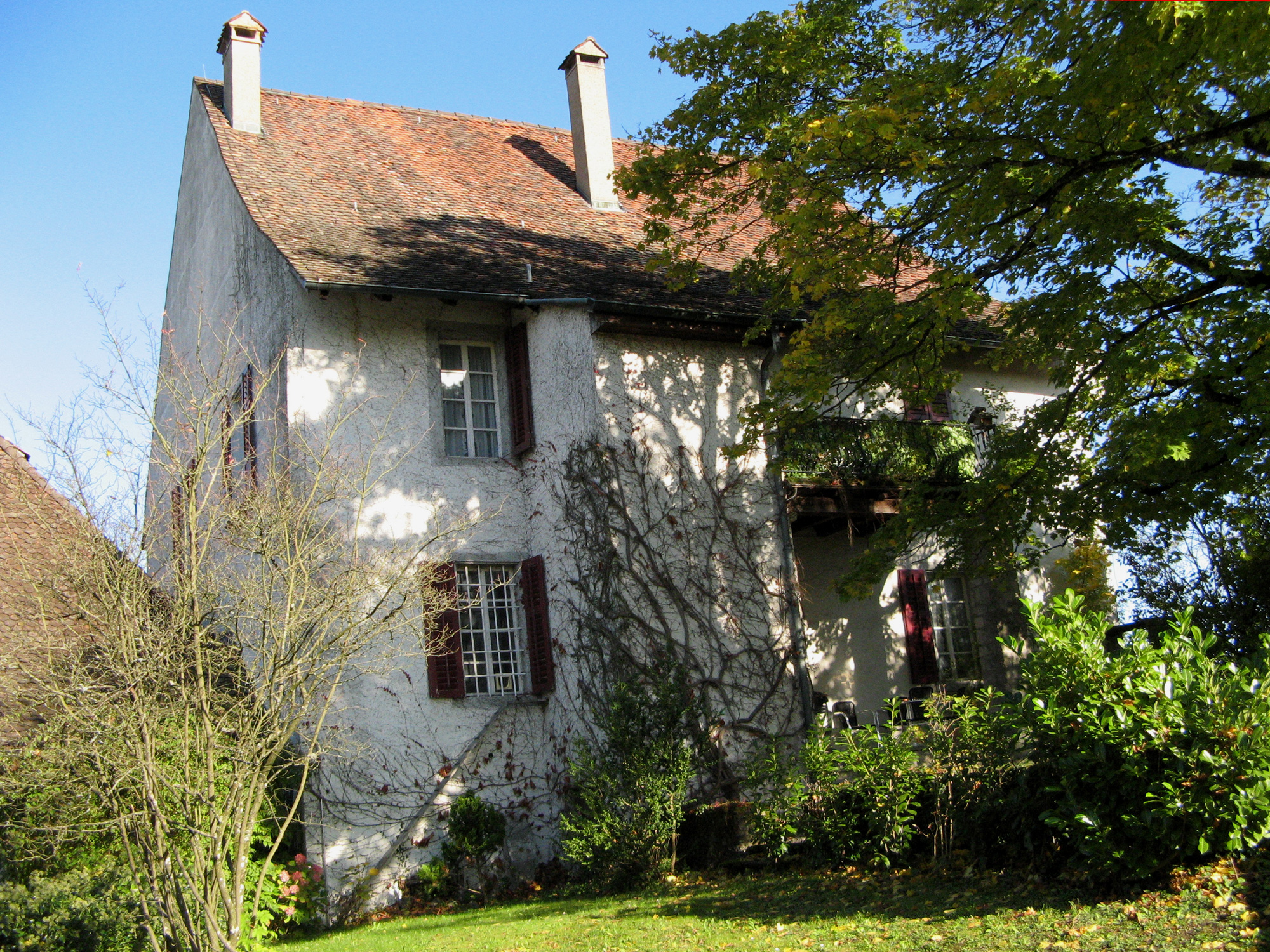 Pfarrhaus neben der Staufbergkirche